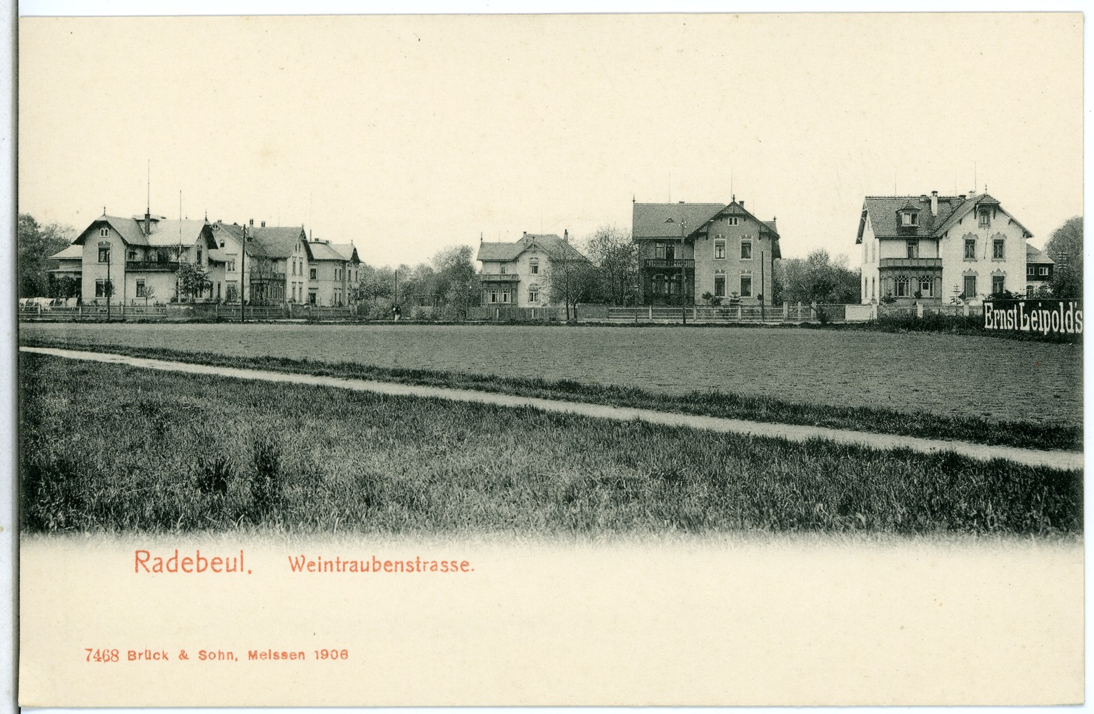 Radebeul; Weintraubenstraße This postcard is from publisher Brück & Sohn in Meißen ( postcard has a unique number 07468 and is available in a higher resolution at the publisher. This images was uploaded in a cooperation project between Wikipedians and the publisher.